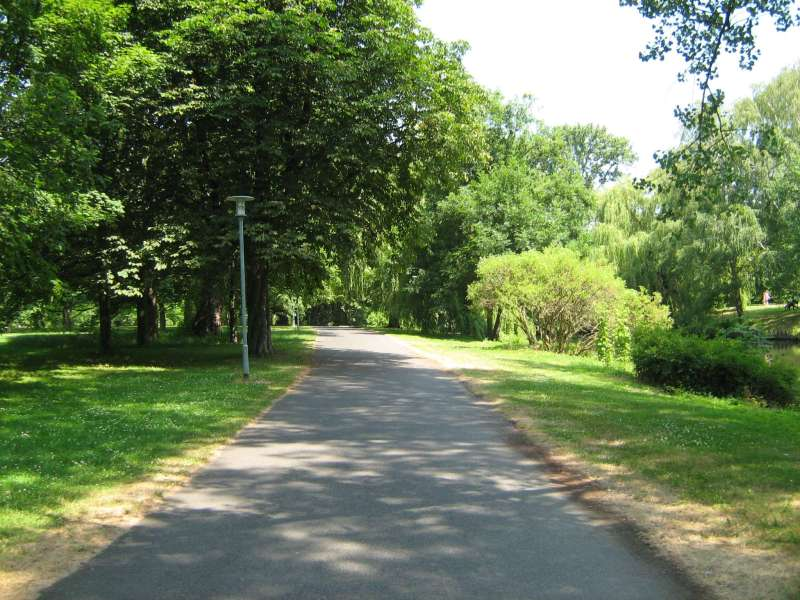 Radweg im Bürgerpark Braunschweig